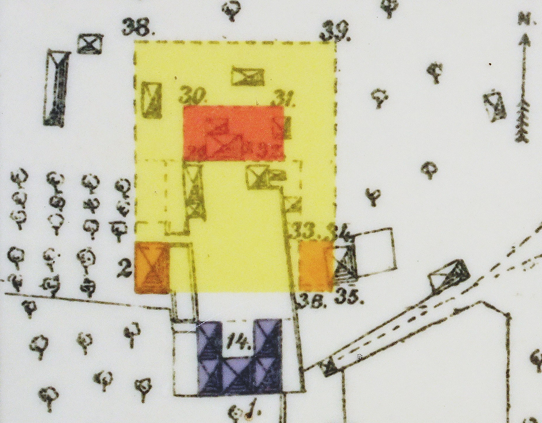 "Grundritning af Näsby säteris åbyggnad" med nuvarande bebyggelse (slott och flyglar) inlagd